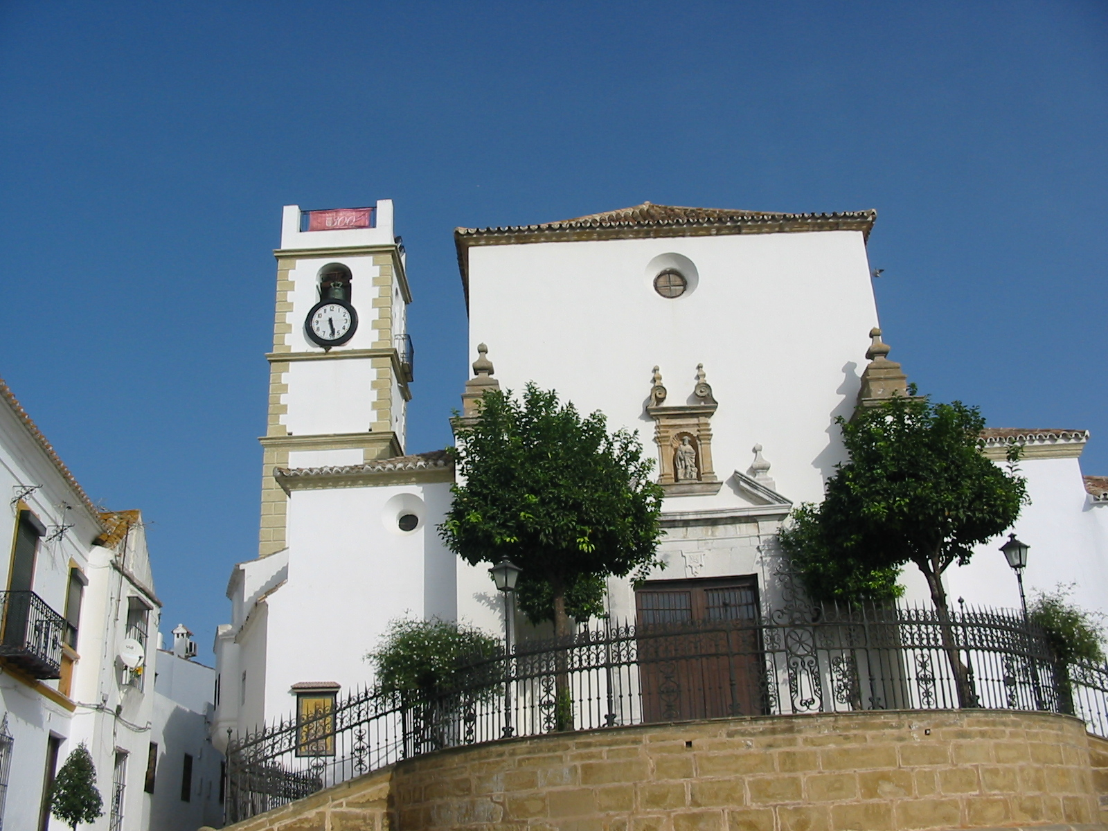 Parroquia Santa María la Coronada (Saint Mary the Crowned Parish Church), San Roque, Cádiz, Andalusia